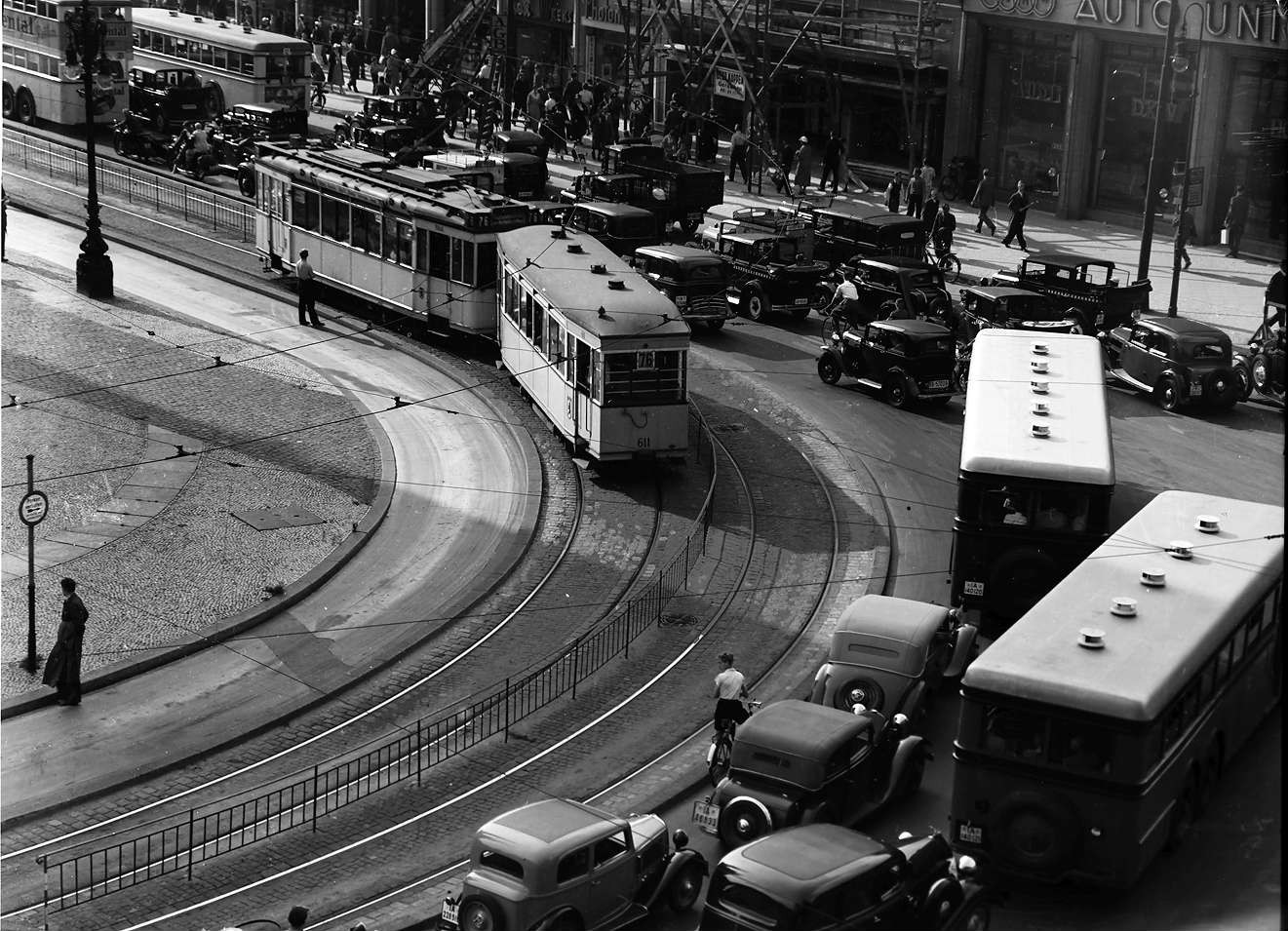 Verkehr auf dem Auguste-Viktoria-Platz (heute Breitscheidplatz) in Berlin-Charlottenburg.